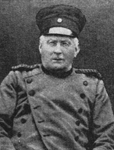 Foto von Kreisoberförster Clemens de Lassaulx (geboren 1809 in Diez, gestorben 1906 in Adenau)